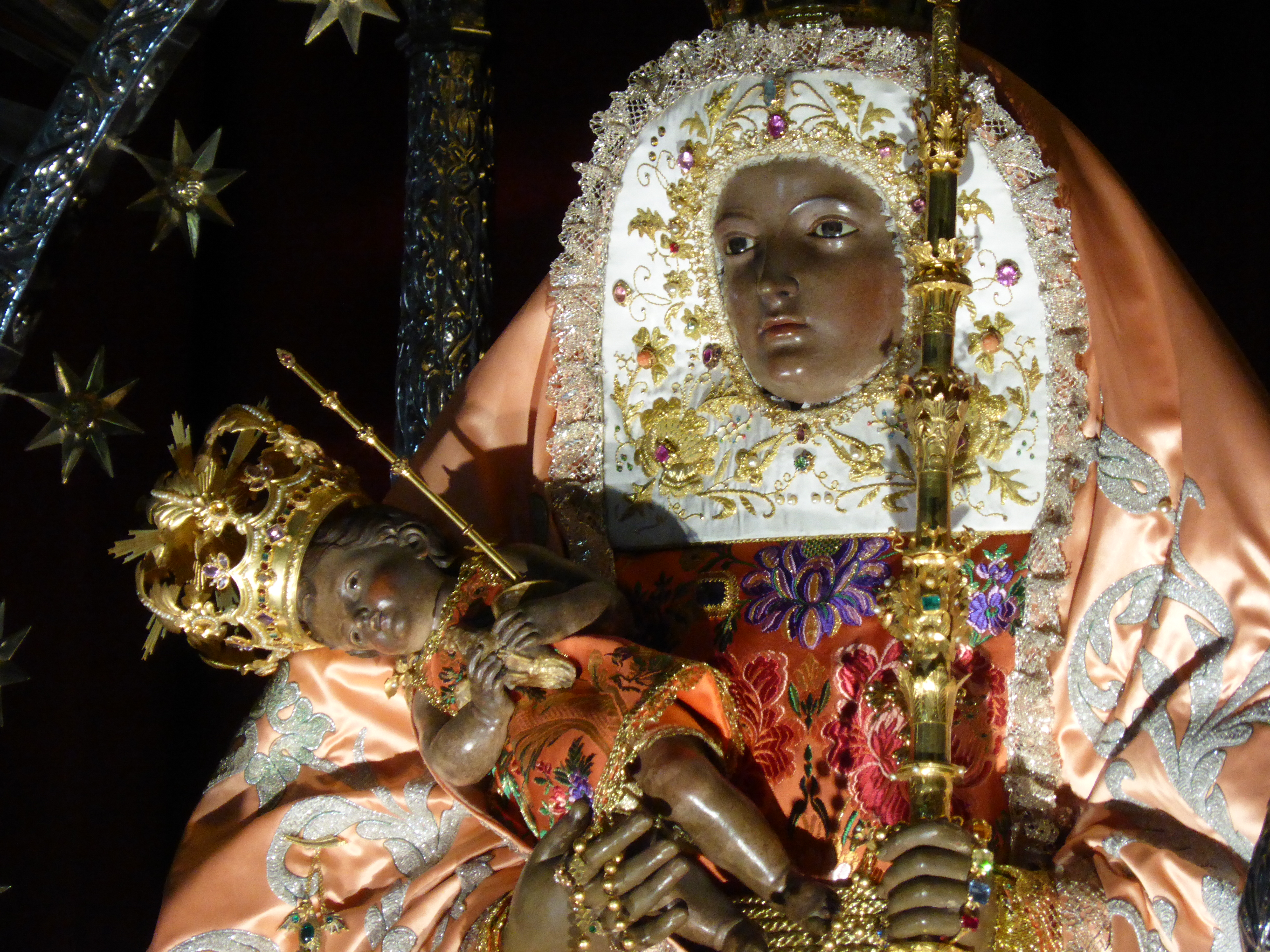 En el municipio de Candelaria (isla de Tenerife) se encuentra la basílica y santuario católico de la Virgen de Candelaria, o "Nuestra Señora de la Candelaria". La imagen actual está fechada en 1827-1828, y es de estilo neoclásico, sustituyendo la talla medieval gótica que se llevó una riada en el año 1826. Es Patrona de Canarias.